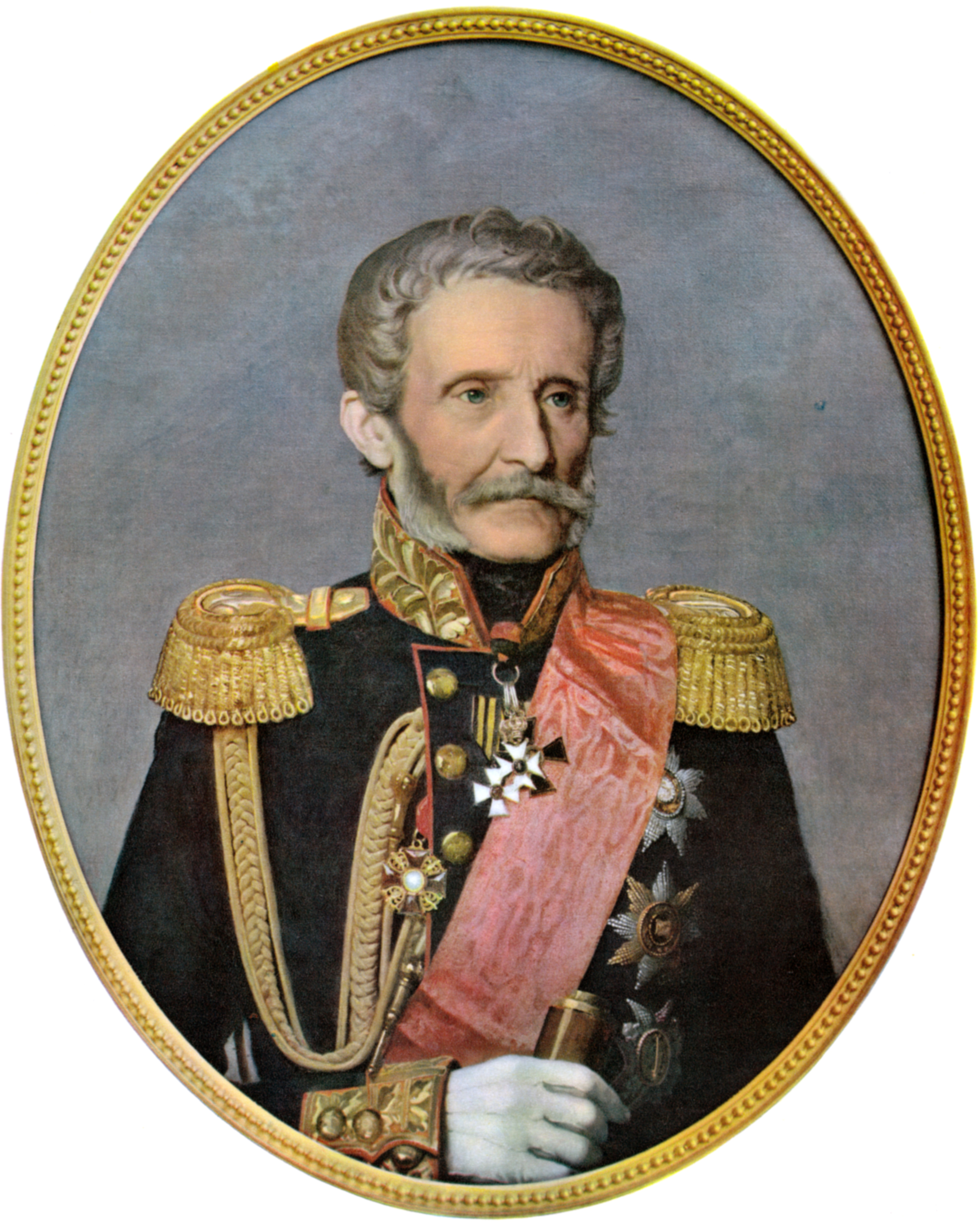 Antoine-Henri Jomini (1779–1869). Generalleutnant in russischen Diensten, Generaladjutant von Zar Nikolaus I. und berühmter Militärschriftsteller. Jomini trägt eine russische Uniform, die Schärpe des Grosskreuzes des russischen St. Anna-Ordens, die Abzeichen als Ritter des russischen Wladimir- und Alexanderordens sowie weitere Orden